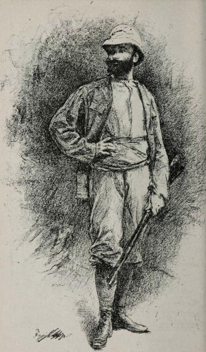 M. le Vicomte de Sanderval